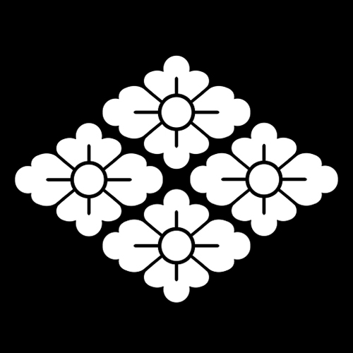 「四つ花菱」紋（染抜）